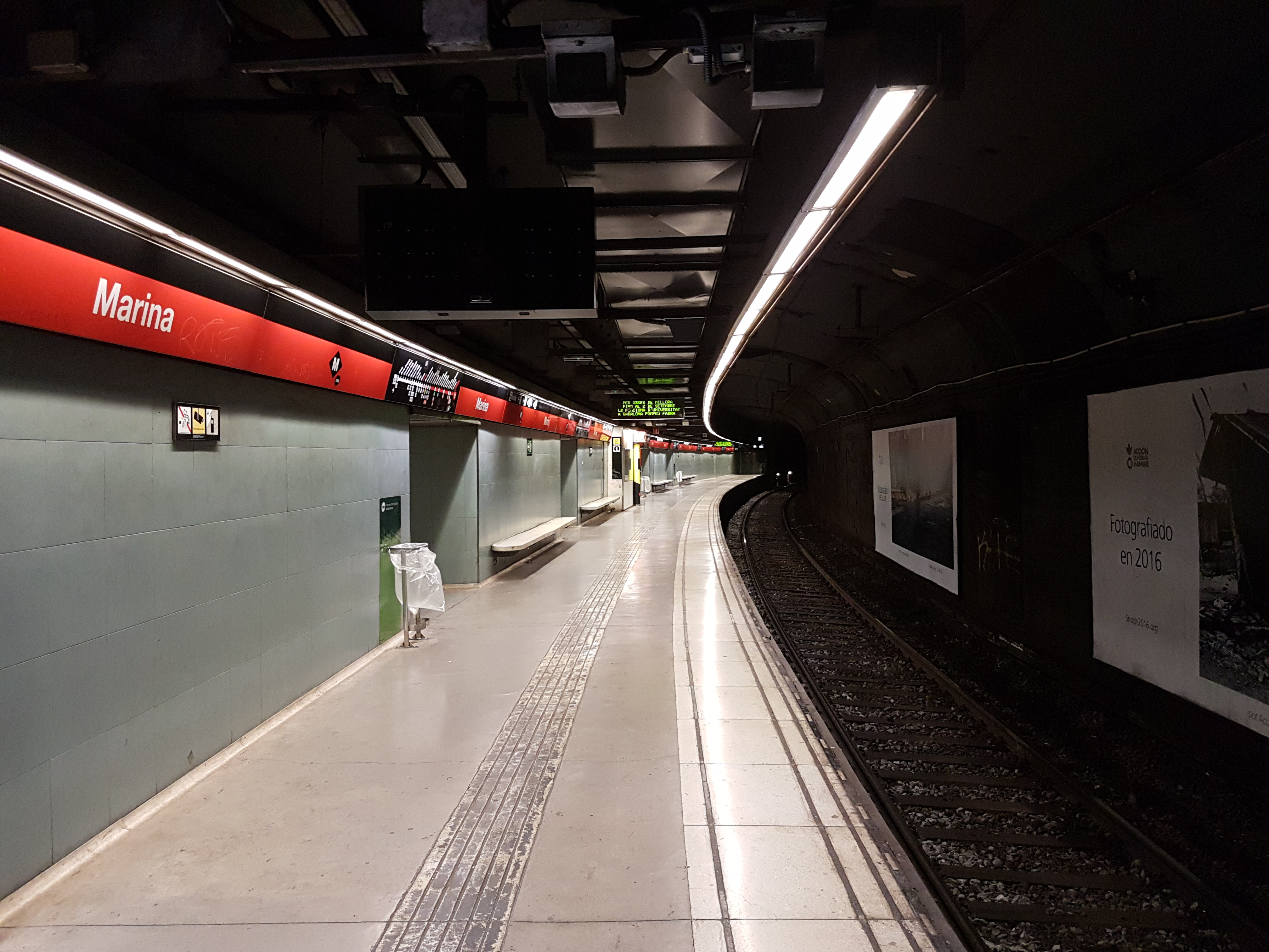 Andana direcció Hospital de Bellvitge de l'estació de Marina de la L1